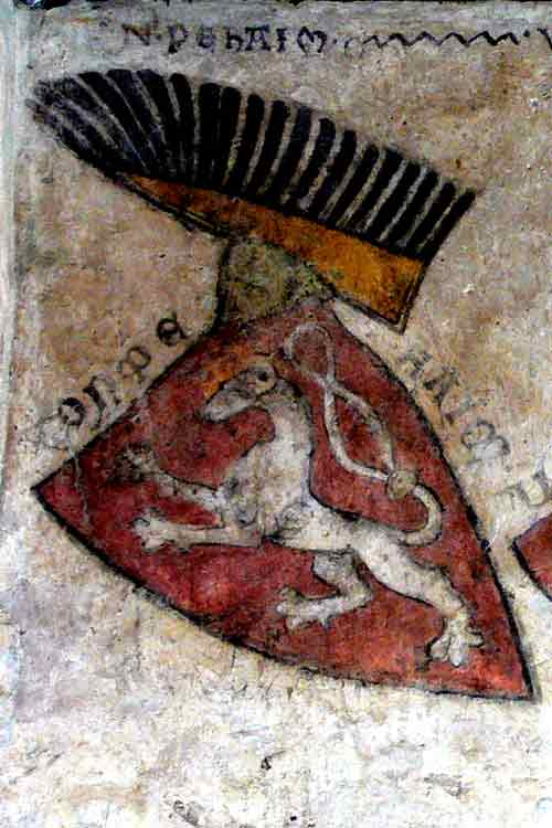 Nejstarší dochované barevné vyobrazení znaku Čech, hrad Gozzoburg v Kremži